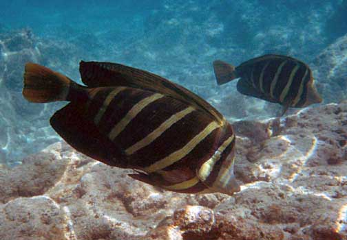 Zebrasoma veliferum